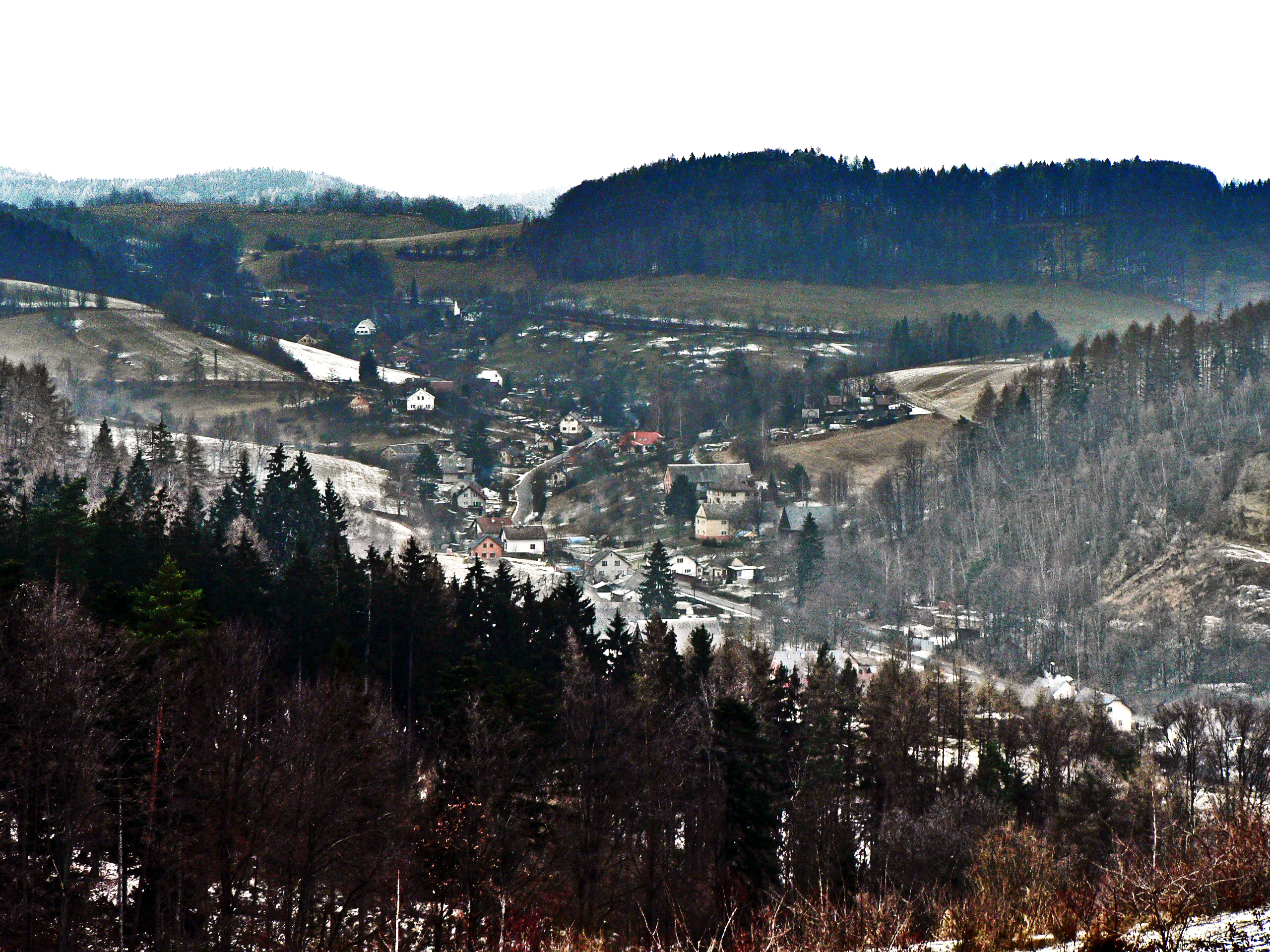 Horní Temenice ze severních svahů Háje (Senové)